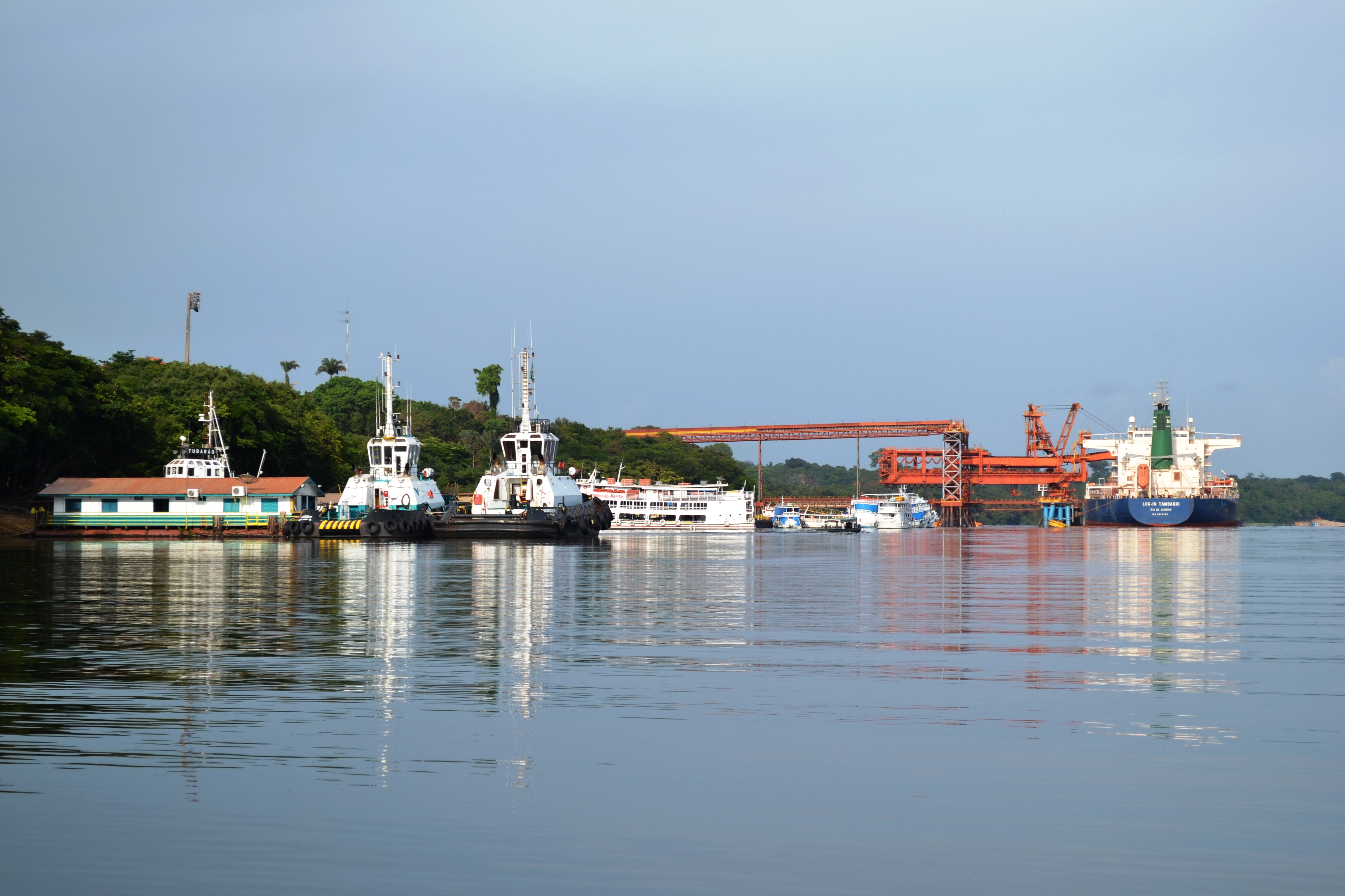 Porto Trombetas está localizada no Noroeste do estado do Pará. A vila foi construída para atender aos trabalhadores da Mineração Rio do Norte (MRN), que faz extração de bauxita. As instalações de Porto Trombetas estão localizadas no município de Oriximiná (PA), à margem direita do rio Trombetas, um dos afluentes do rio Amazonas. As atividades de extração de bauxita da empresa são realizadas no interior da Floresta Nacional (Flona) Saracá-Taquera, uma unidade de conservação de uso sustentável criada por Decreto Federal em 1989, e que está sob a gestão do Instituto Chico Mendes de Conservação da Biodiversidade (ICMBio). A Flona tem 429.600 hectares de área e está localizada à margem direita do rio Trombetas, limitando-se ao norte com a Reserva Biológica do Rio Trombetas, outra unidade de conservação federal. A parceria com o órgão ambiental para a preservação da Saracá-Taquera é resultado de um convênio assinado inicialmente com o Instituto Brasileiro do Meio Ambiente e dos Recursos Naturais Renováveis (Ibama), com o objetivo de monitorar, fiscalizar, realizar pesquisas científicas, promover educação ambiental e implantar projetos de alternativa de renda voltados à conservação dos recursos naturais. Posteriormente, em 2007, com a criação do ICMBio pelo governo federal, este assumiu a tarefa que hoje garante, entre outros, a preservação de espécies em extinção, como a tartaruga-da-amazônia. Mais informações